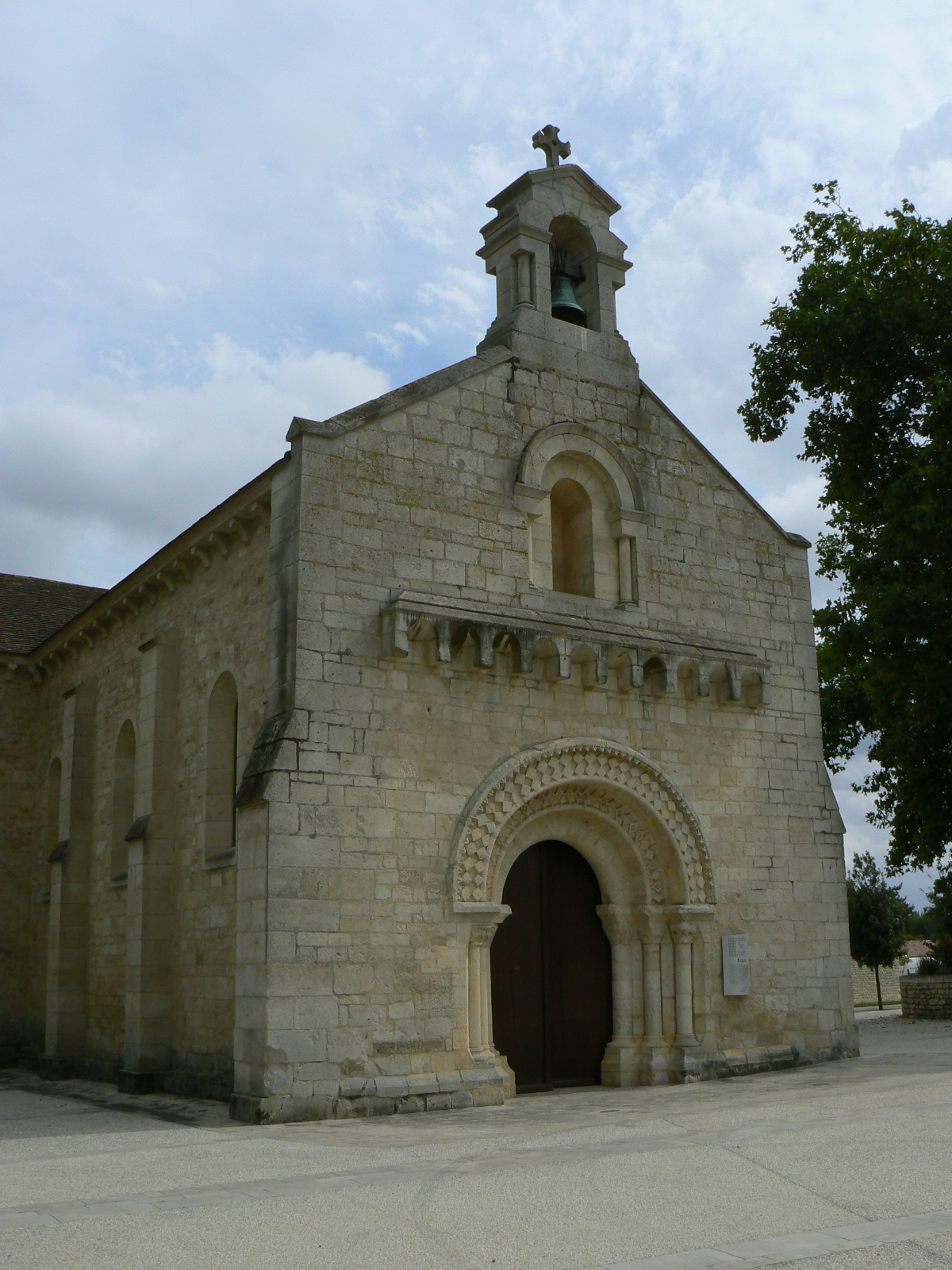 Église Saint-Pierre de Chauray, (Inscrit, 1991) .